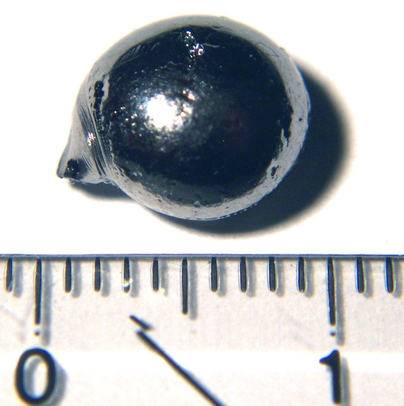 reinst Rhenium 99,99%, 3,33g Schmelzperle, lichtbogengeschmolzen